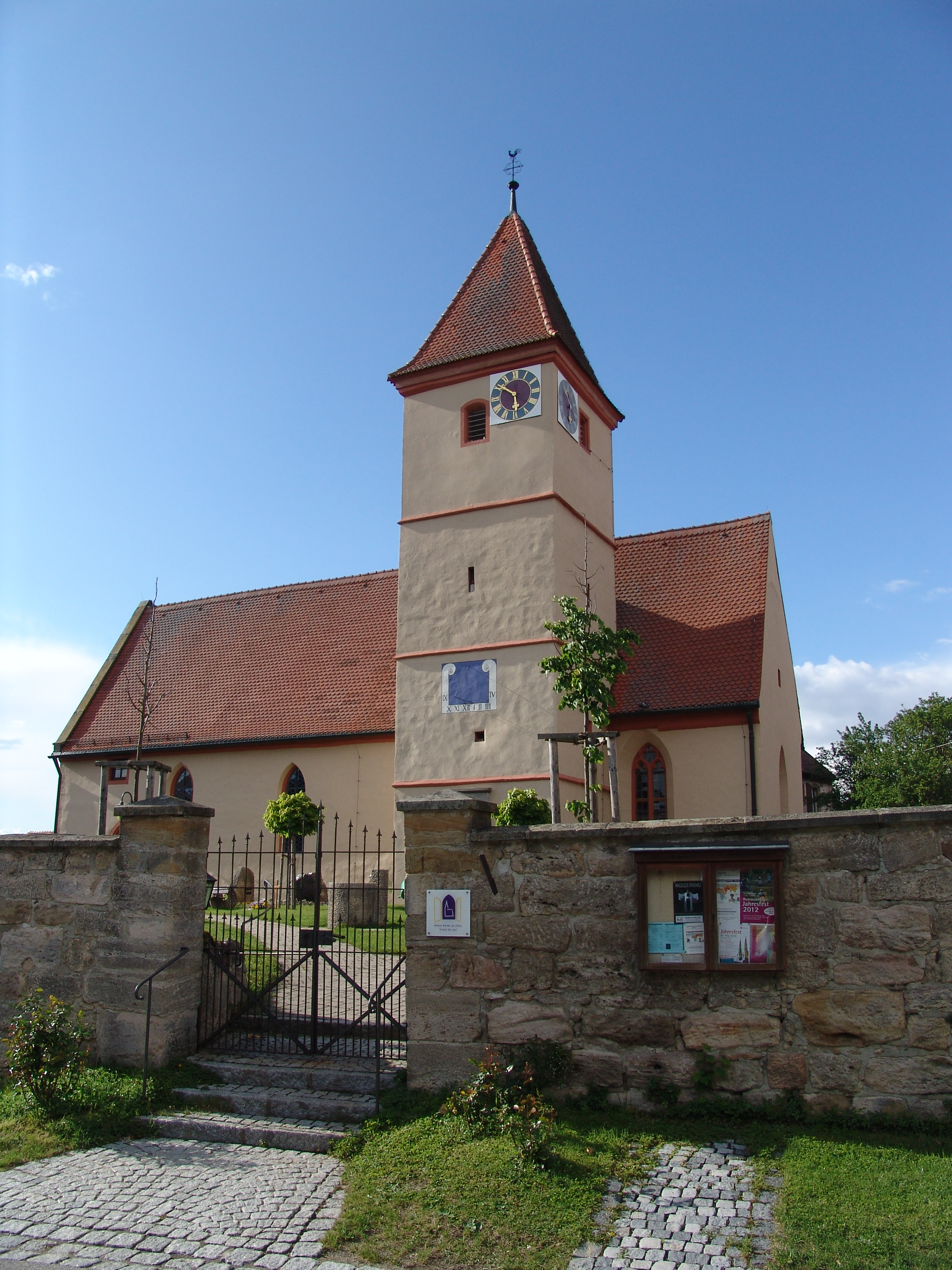 evang.-luth. Kirche St. Ottilia in Schweinsdorf